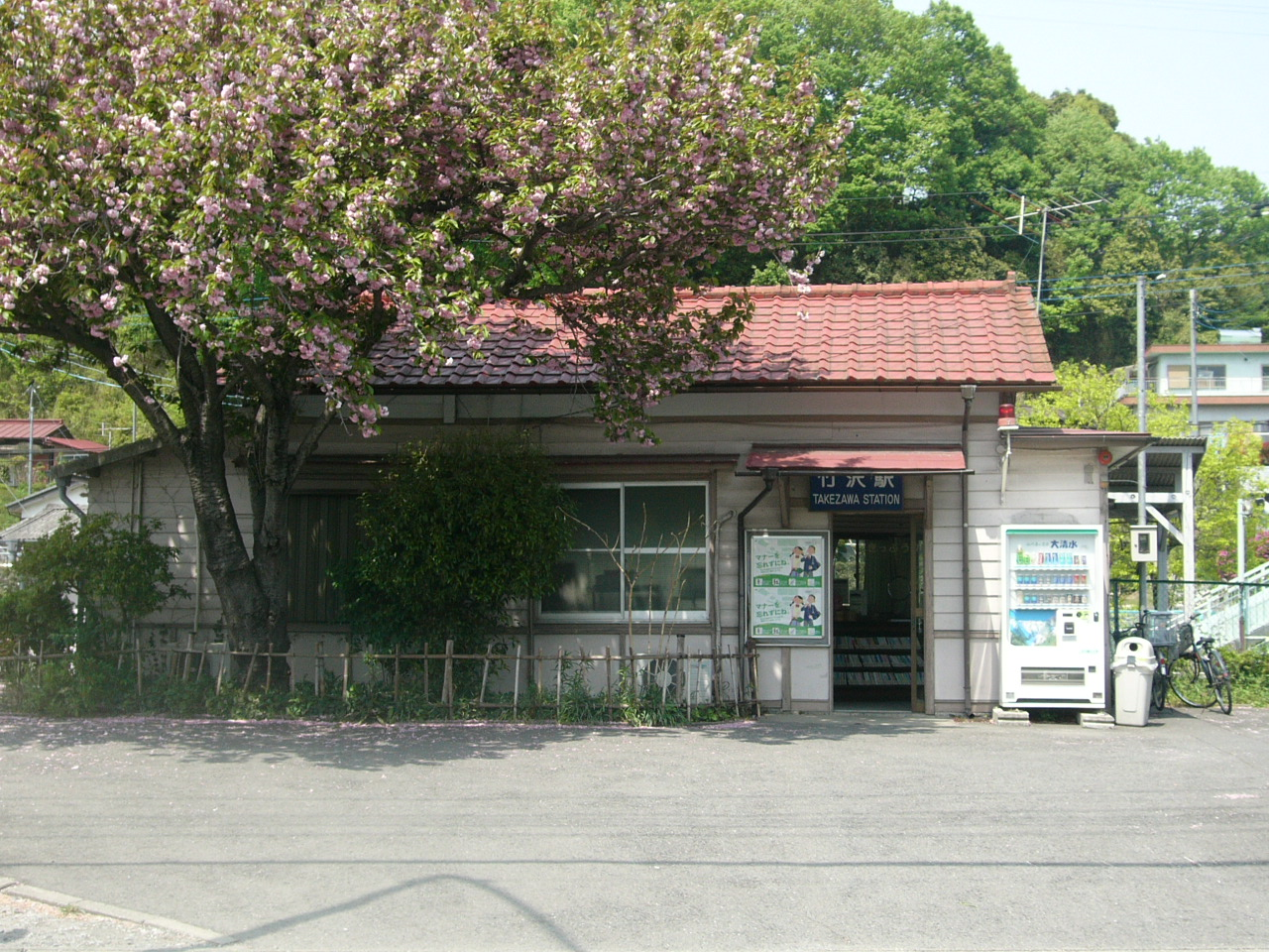 Takezawa Station